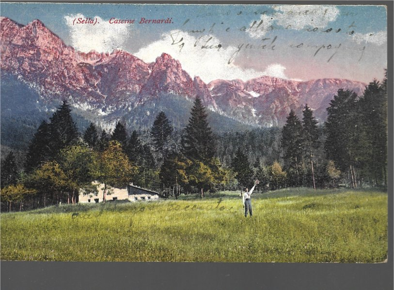 Sella - Cascine Bernardi